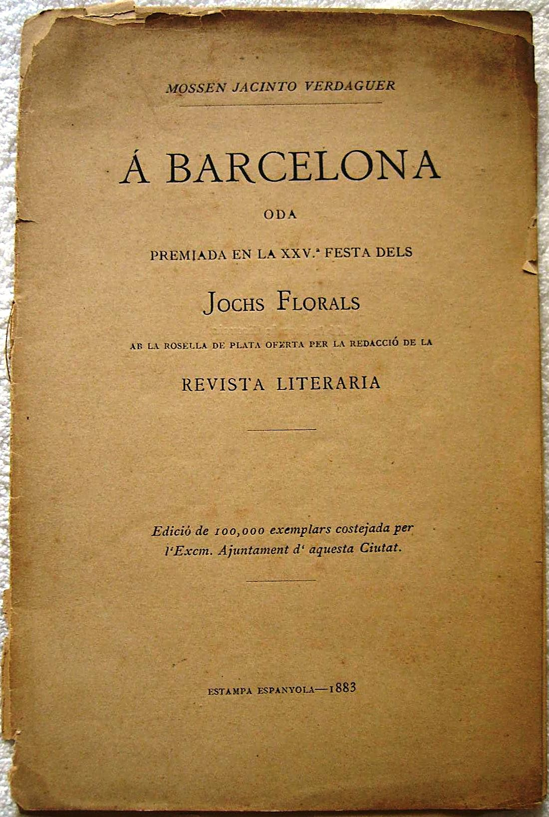 Oda a Barcelona